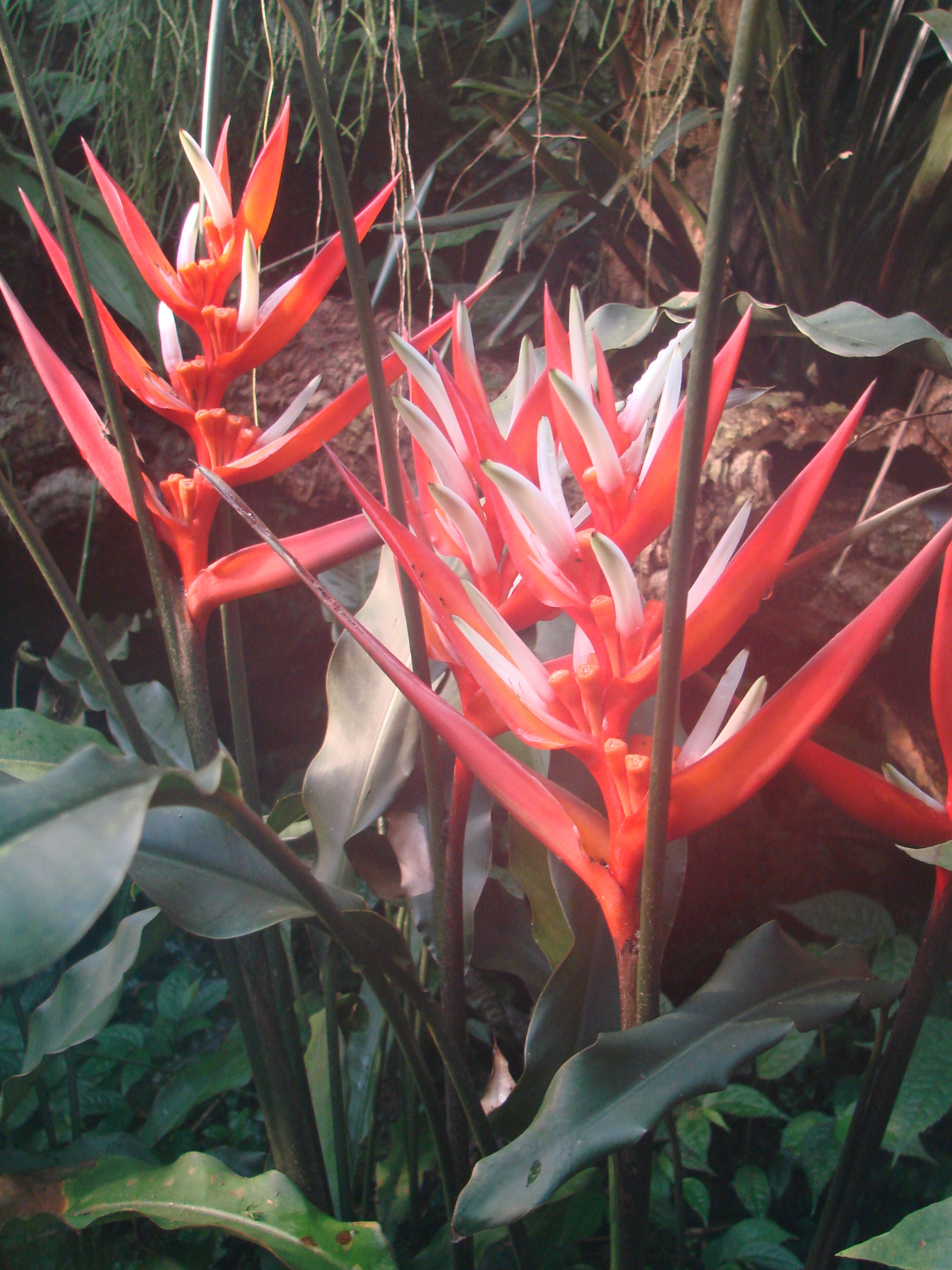 Jardin botanique de l'Université de Zurich (Suisse) : Heliconia angusta